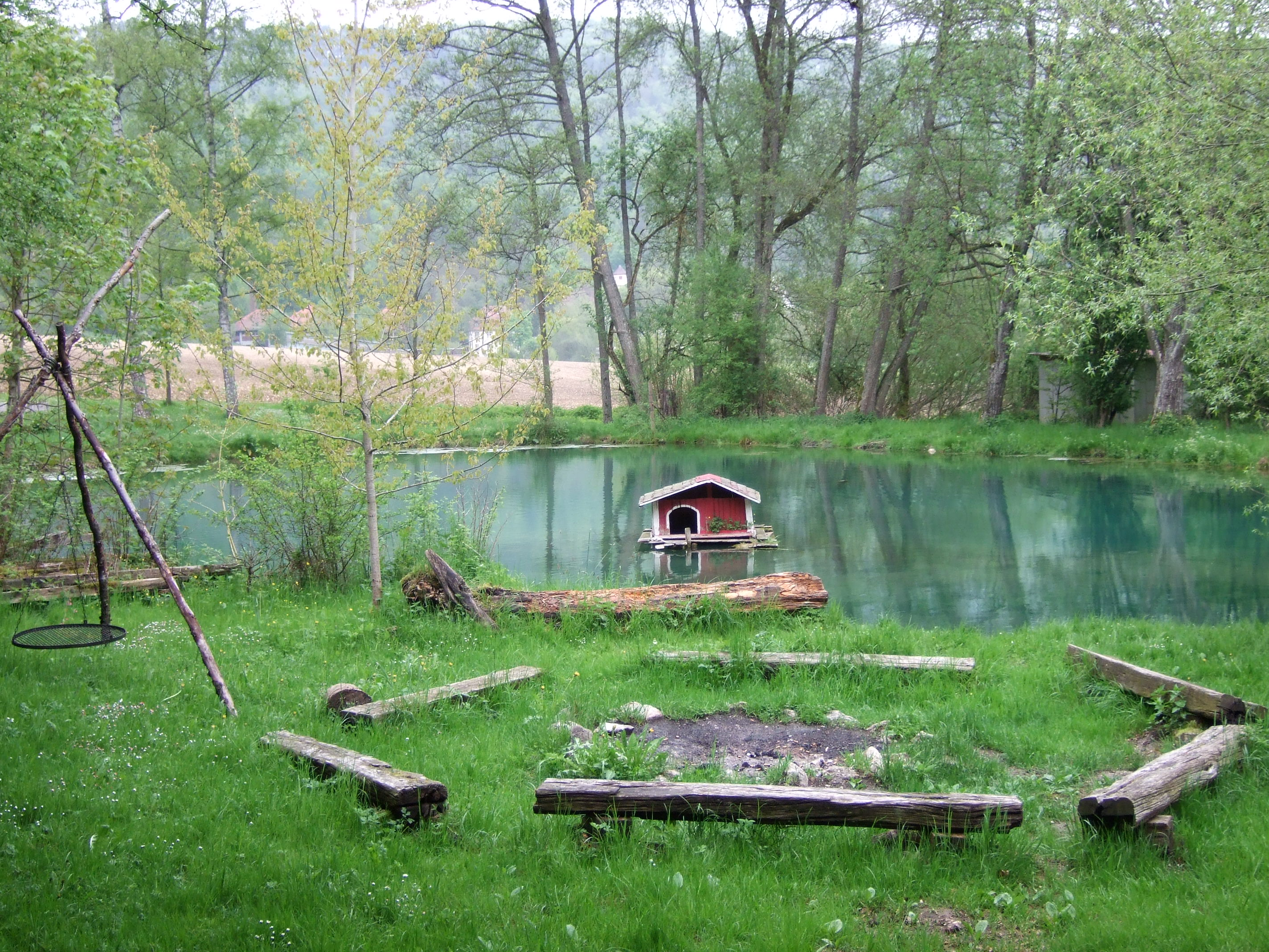 Der Achtopf bei Schelklingen